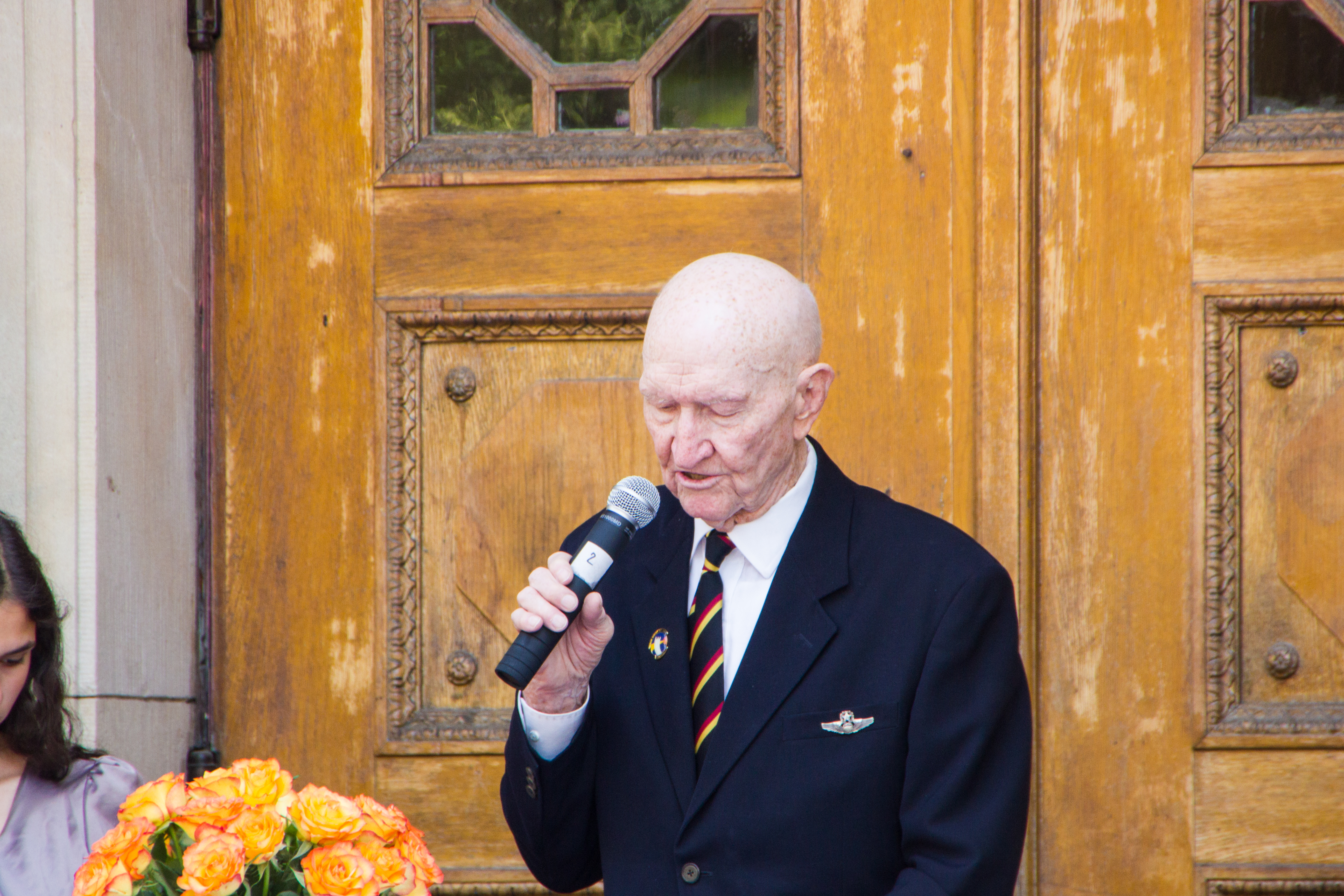 Gail Halvorsen bei der Einweihung der Gail S. Halvorsen Schule in Berlin-Dahlem am 15. Juni 2013